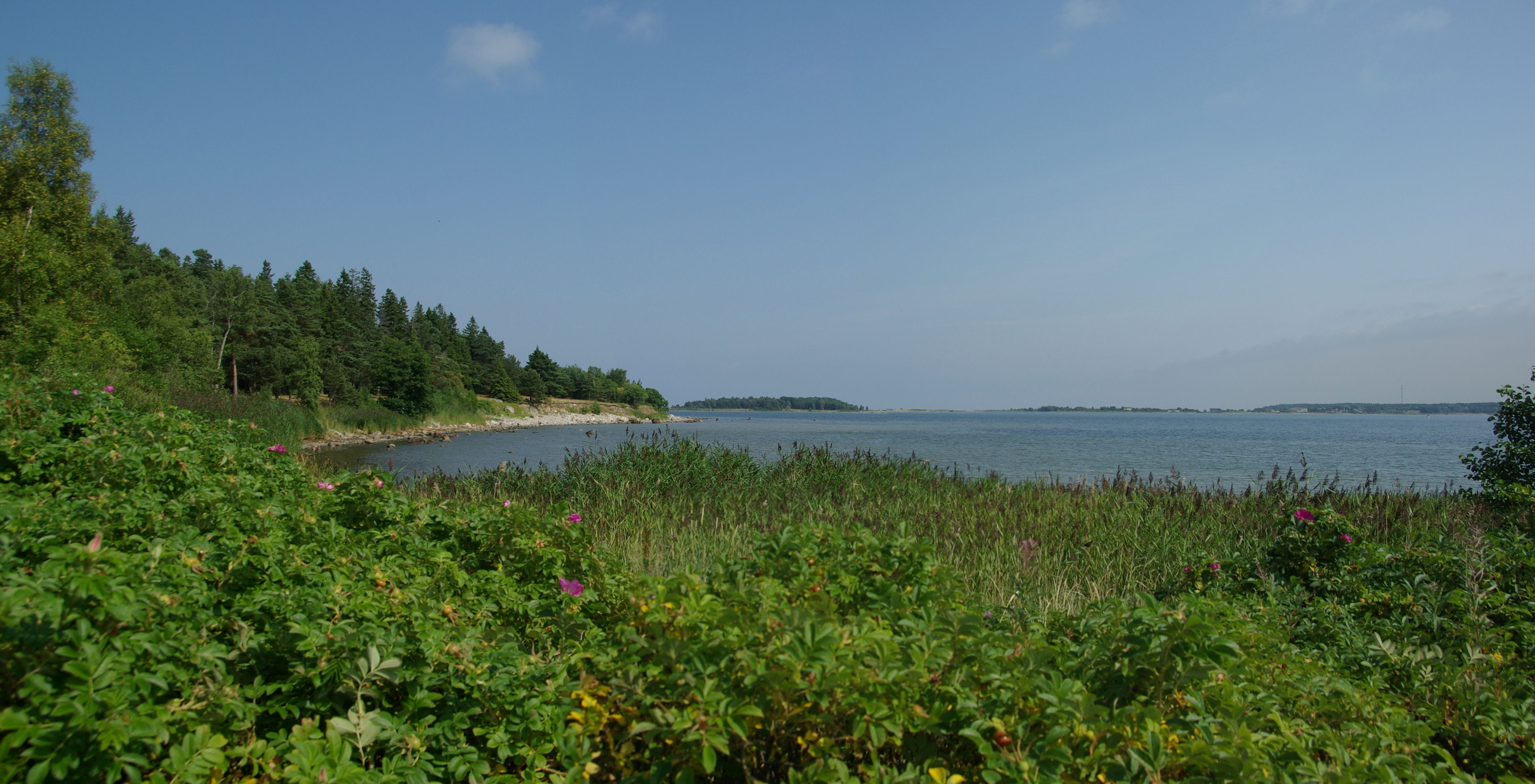 Karnapi neem on neem Aegna saarel,Harjumaal